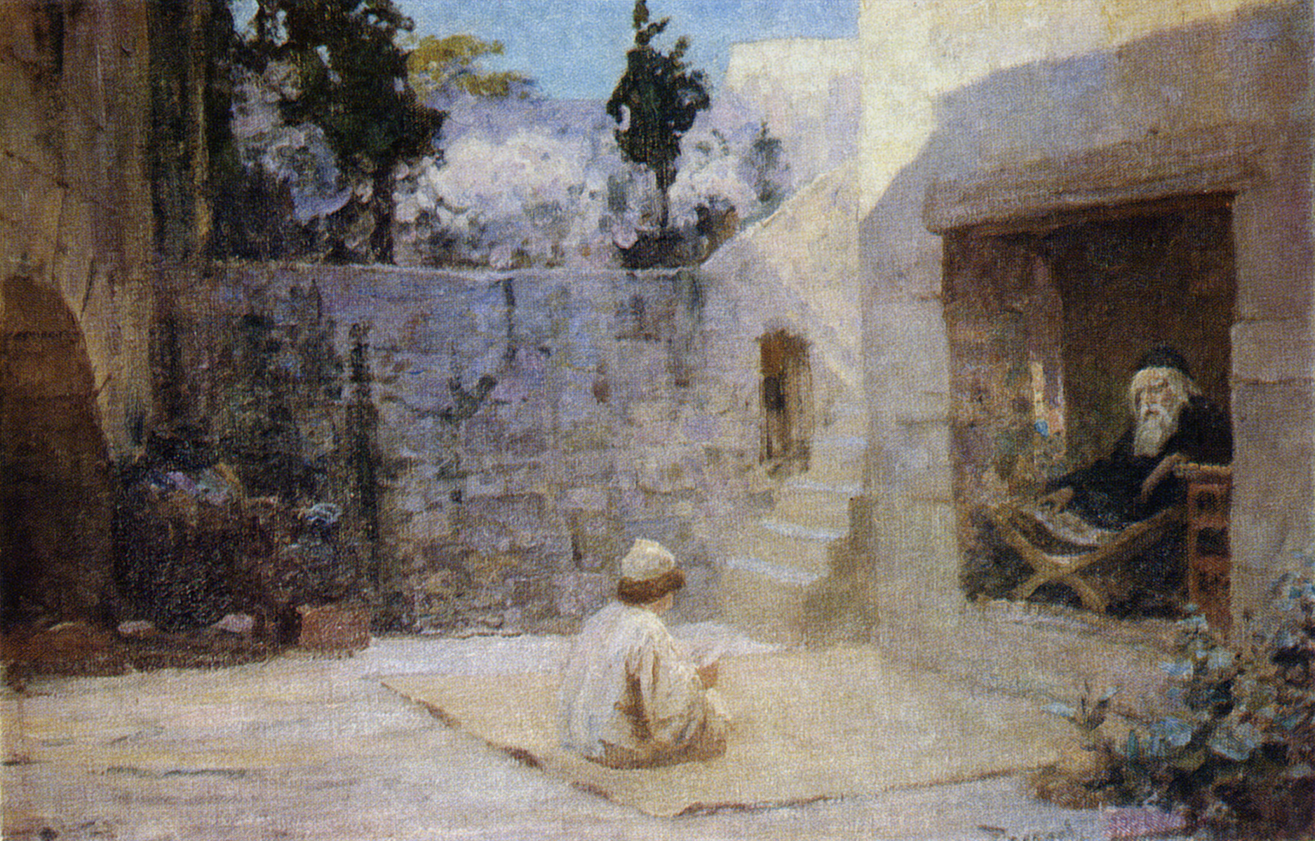 Поленов Василий (1844-1927). Исполнился премудрости, 1896-1909. Нижегородский государственный художественный музей.